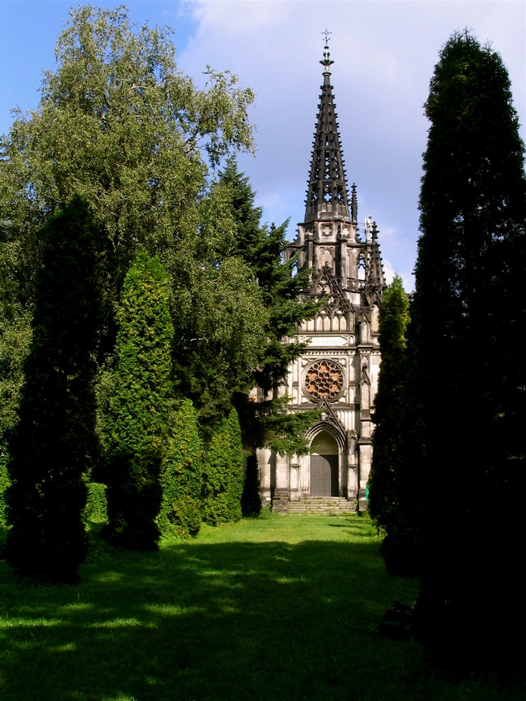 Kaplica Karola Scheiblera na Starym Cmentarzu w Łodzi